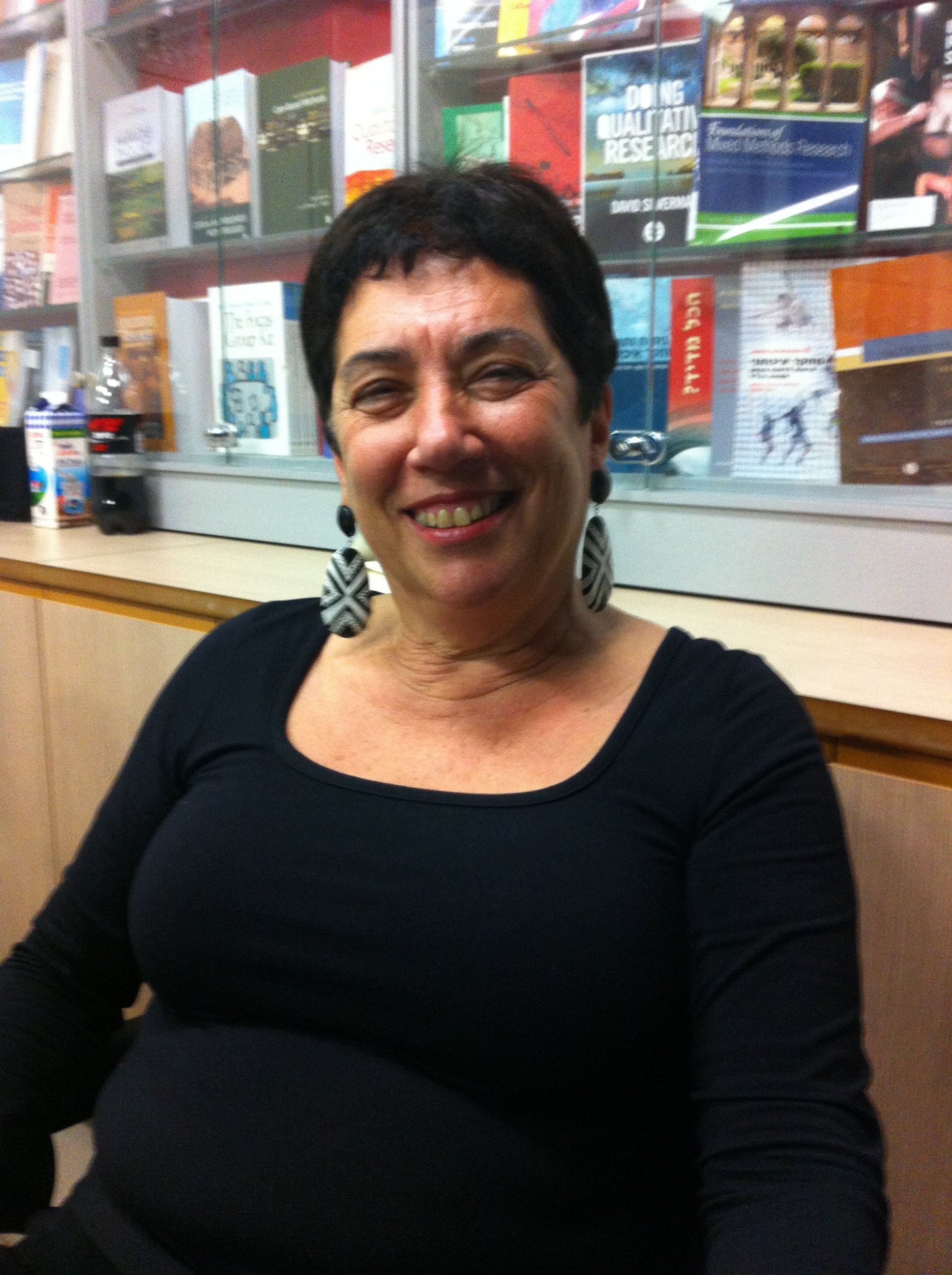 שולמית ריינהרץ